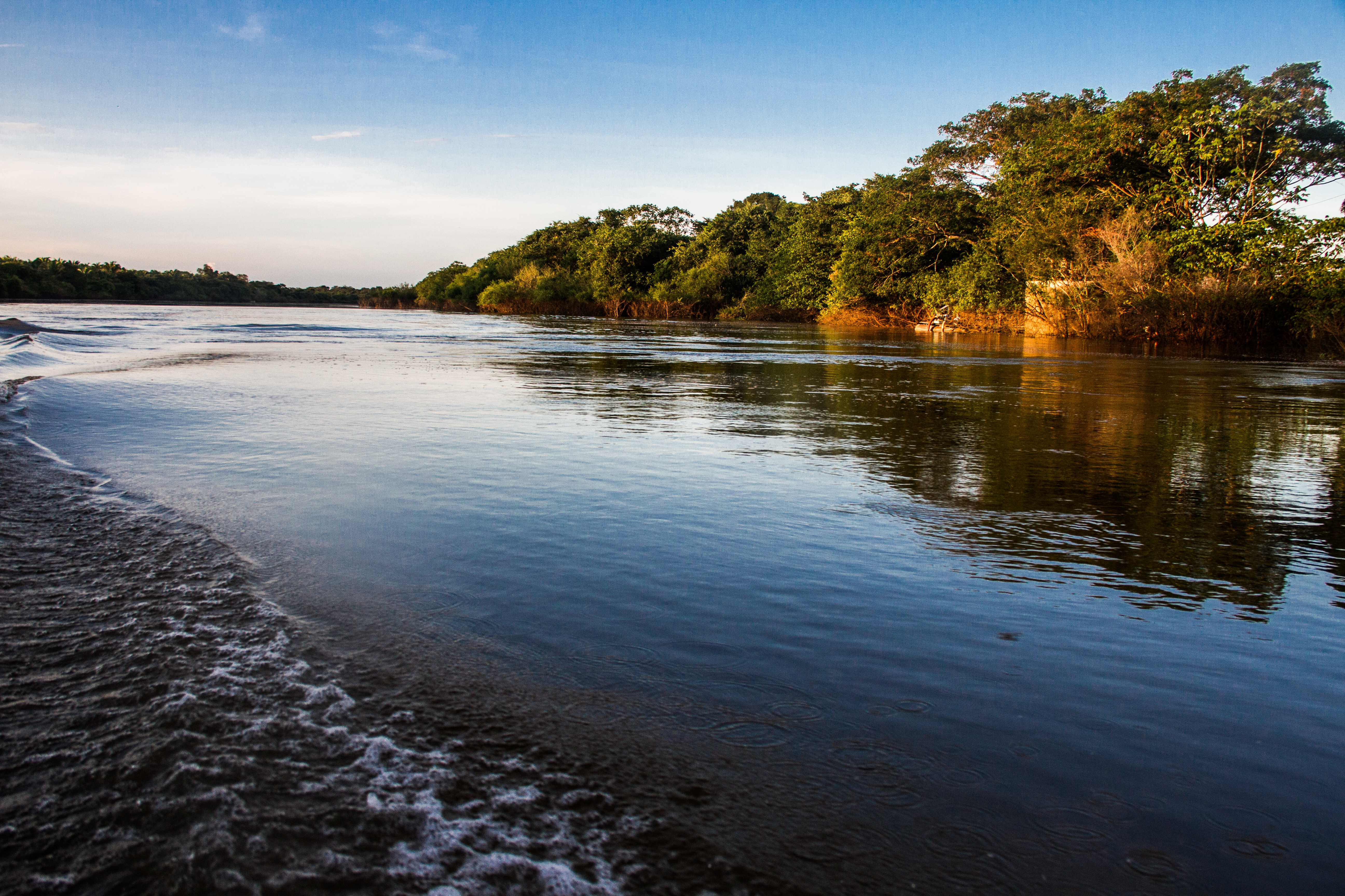 Pôr do sol no Rio Javaés.